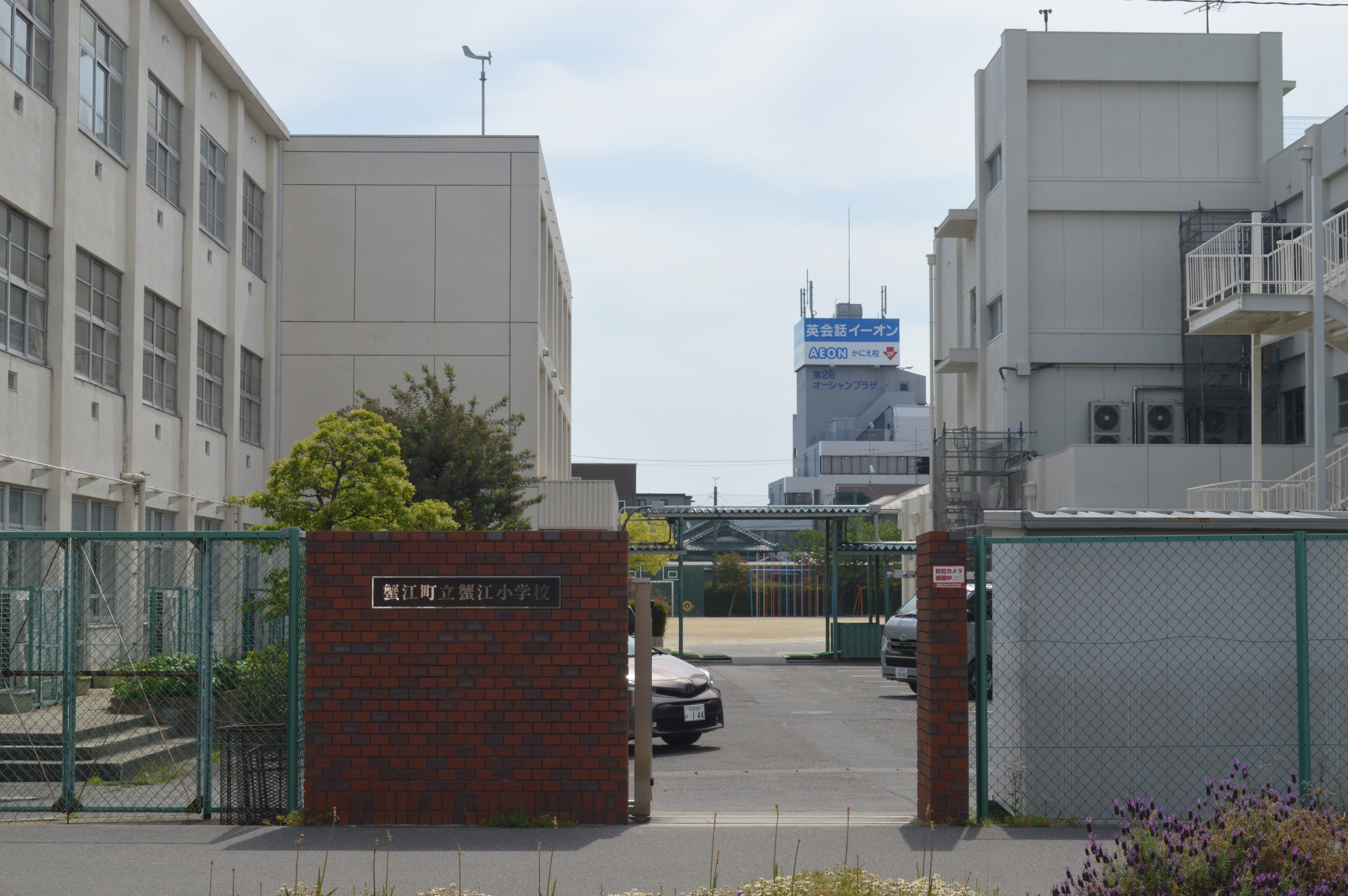 愛知県海部郡蟹江町にある蟹江町立蟹江小学校。